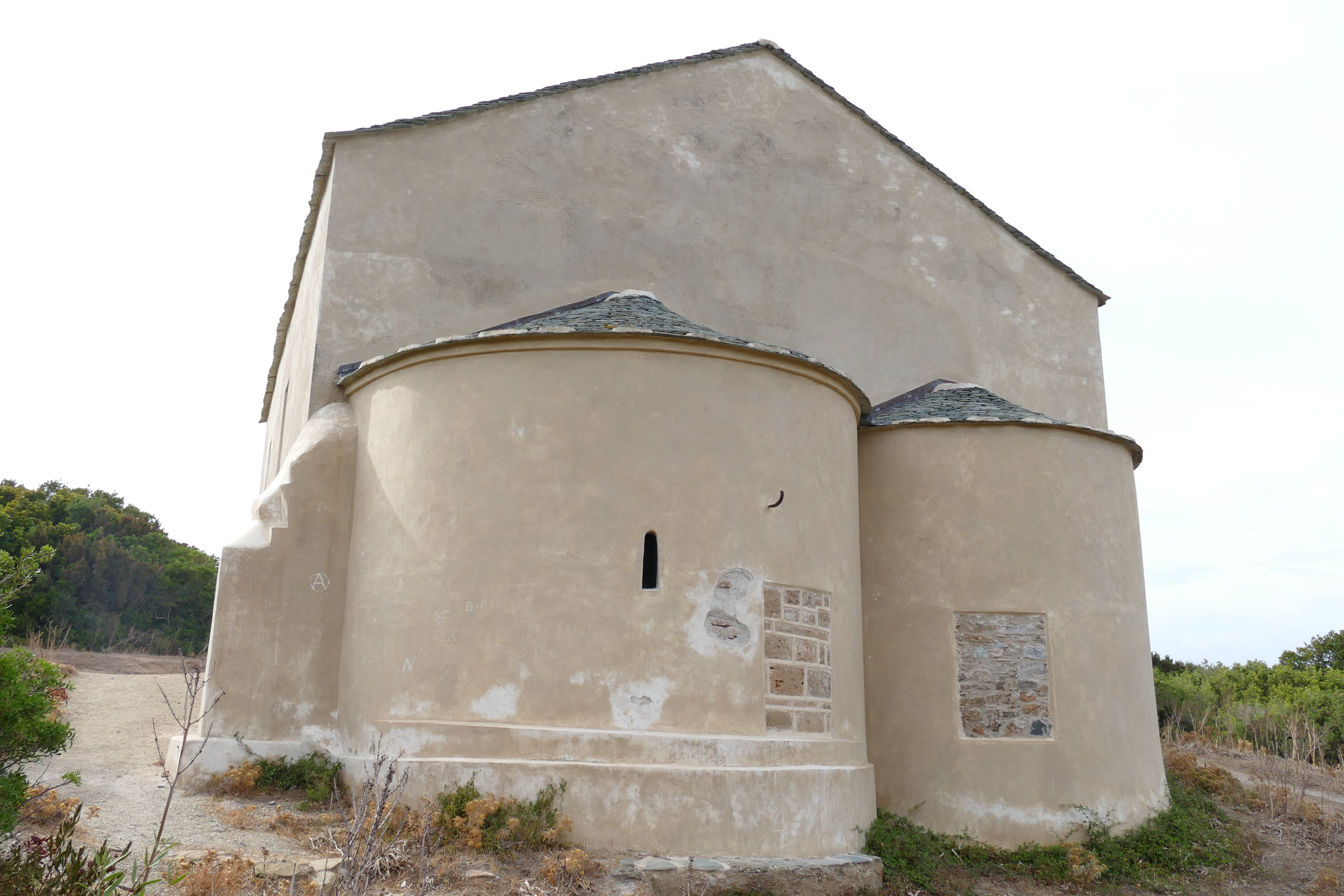 Chapellle Santa Maria